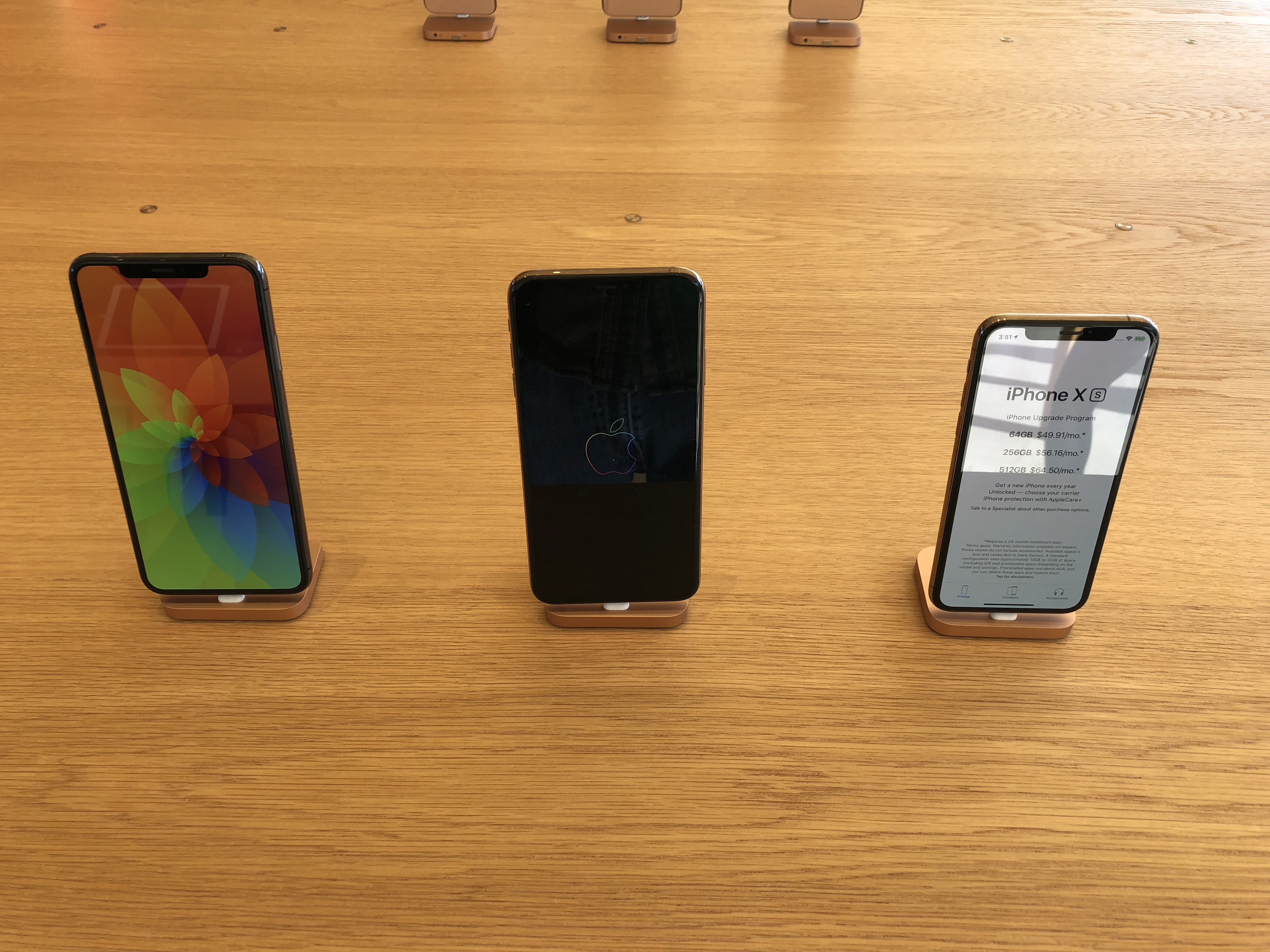 IPhone XS